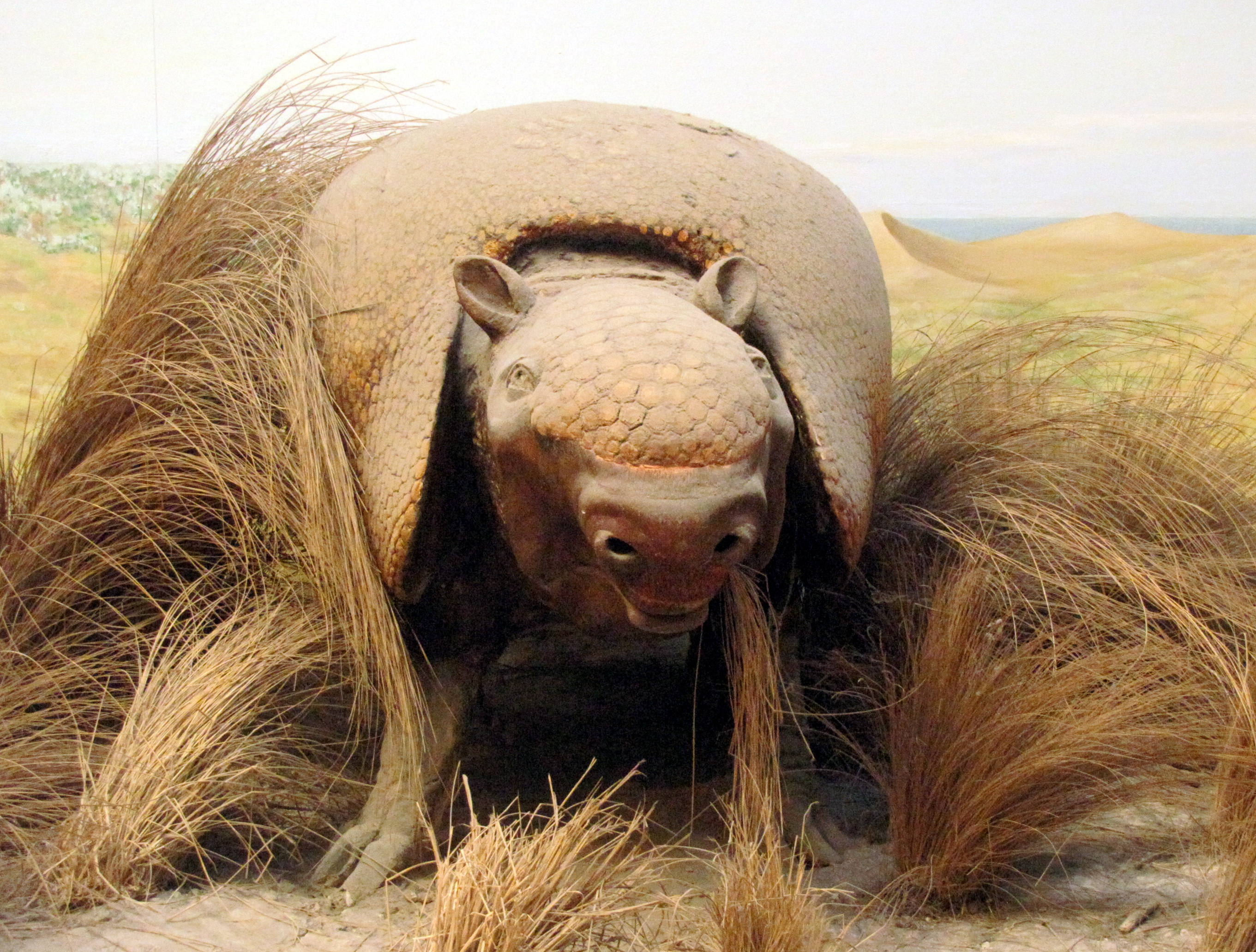 Esqueleto de un Esclerocalipto (Esclerocalyptus ornatus). Proviene de excavaciones y afloramientos en las mágenes de ríos y arroyos de la Provincia de Buenos Aires. Museo de Ciencias Naturales de La Plata.